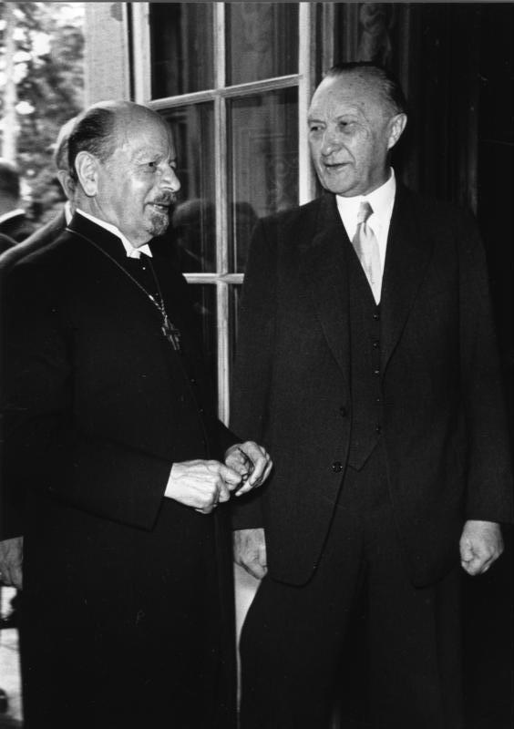 Bundeskanzler Konrad Adenauer und der Ratsvorsitzende der Evangelischen Kirche Deutschlands, Bischof Dibelius unterzeichneten am 20.2.1957 in Bonn einen Vertrag über die Militärseelsorge in der Bundeswehr.